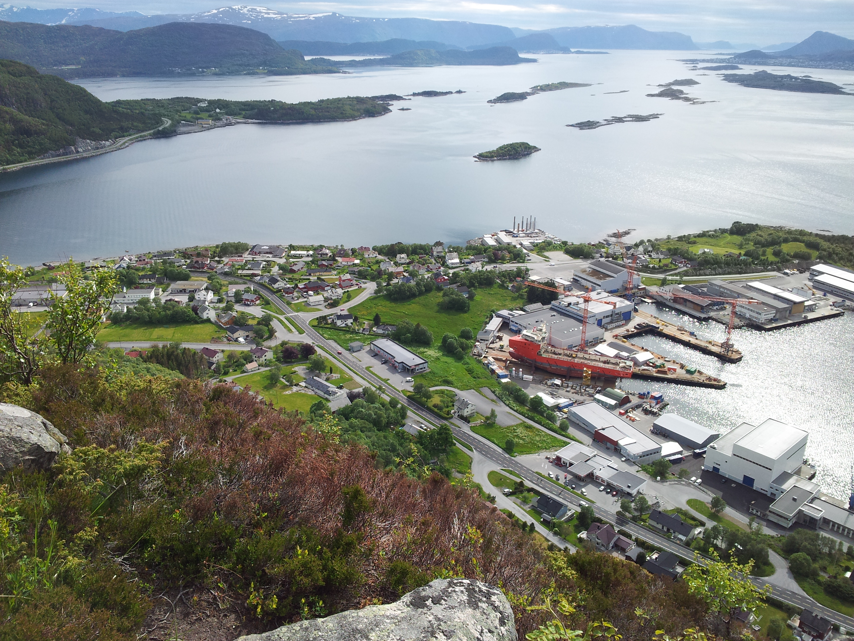 Søvika sett fra Hagefjellet.